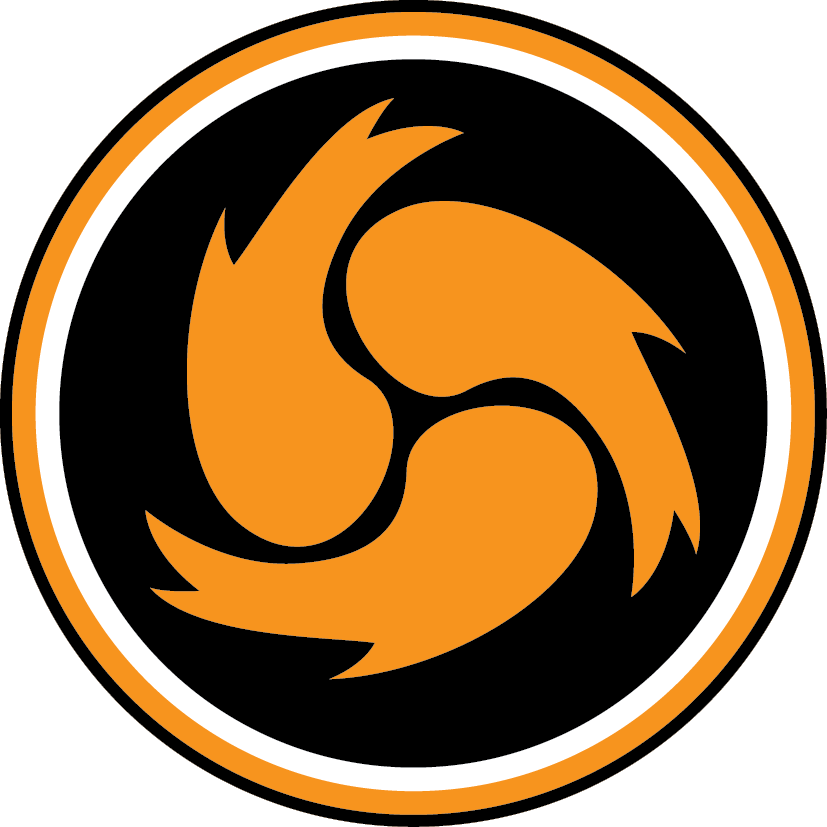 의무소방원 기능구분표지장